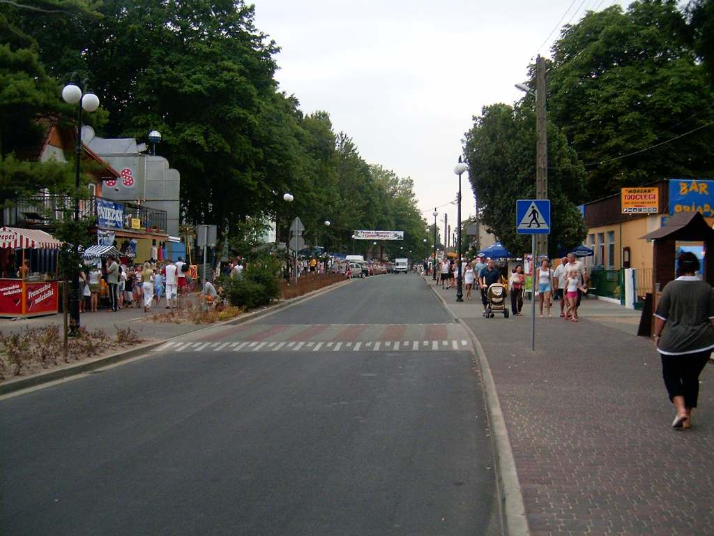 Dziwnów. Ulica Mickiewicza